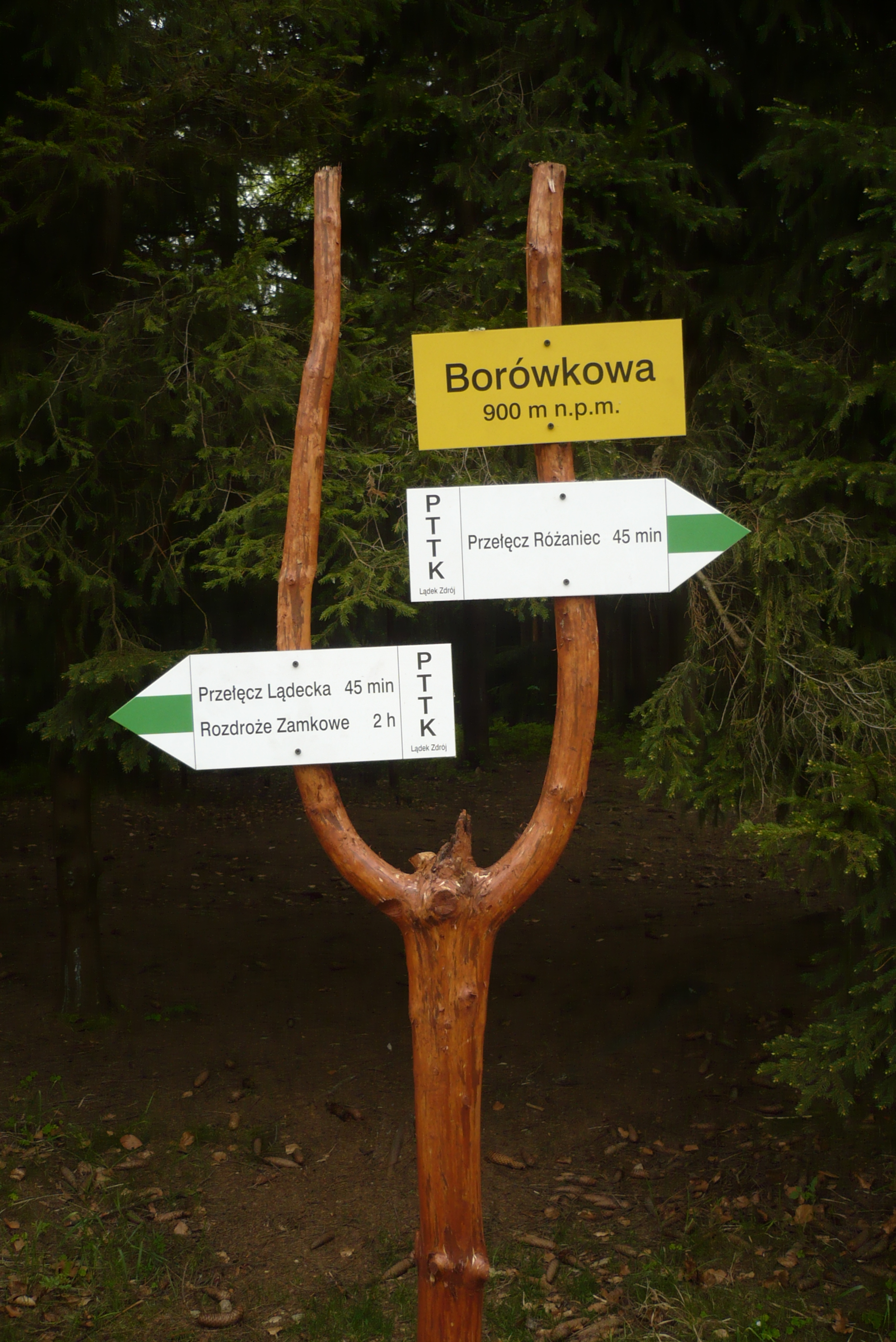 Borówkowa